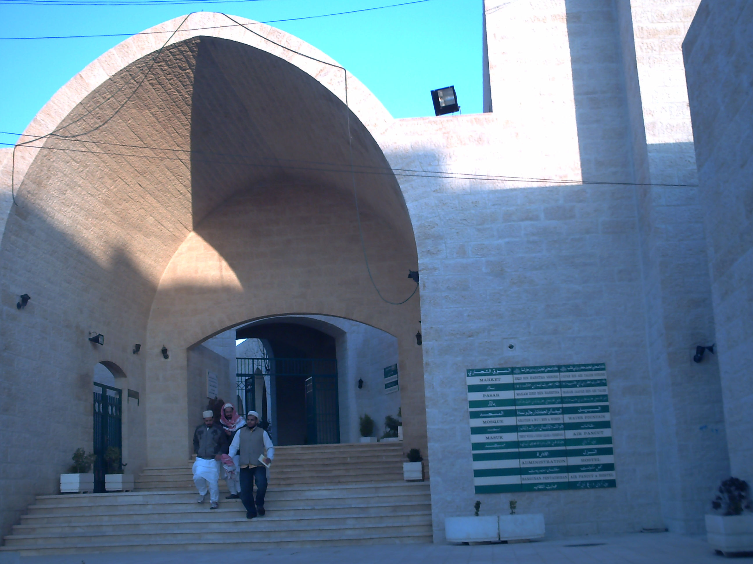 Mausoleum_,Jafer-ut-Tayyar,Jordan